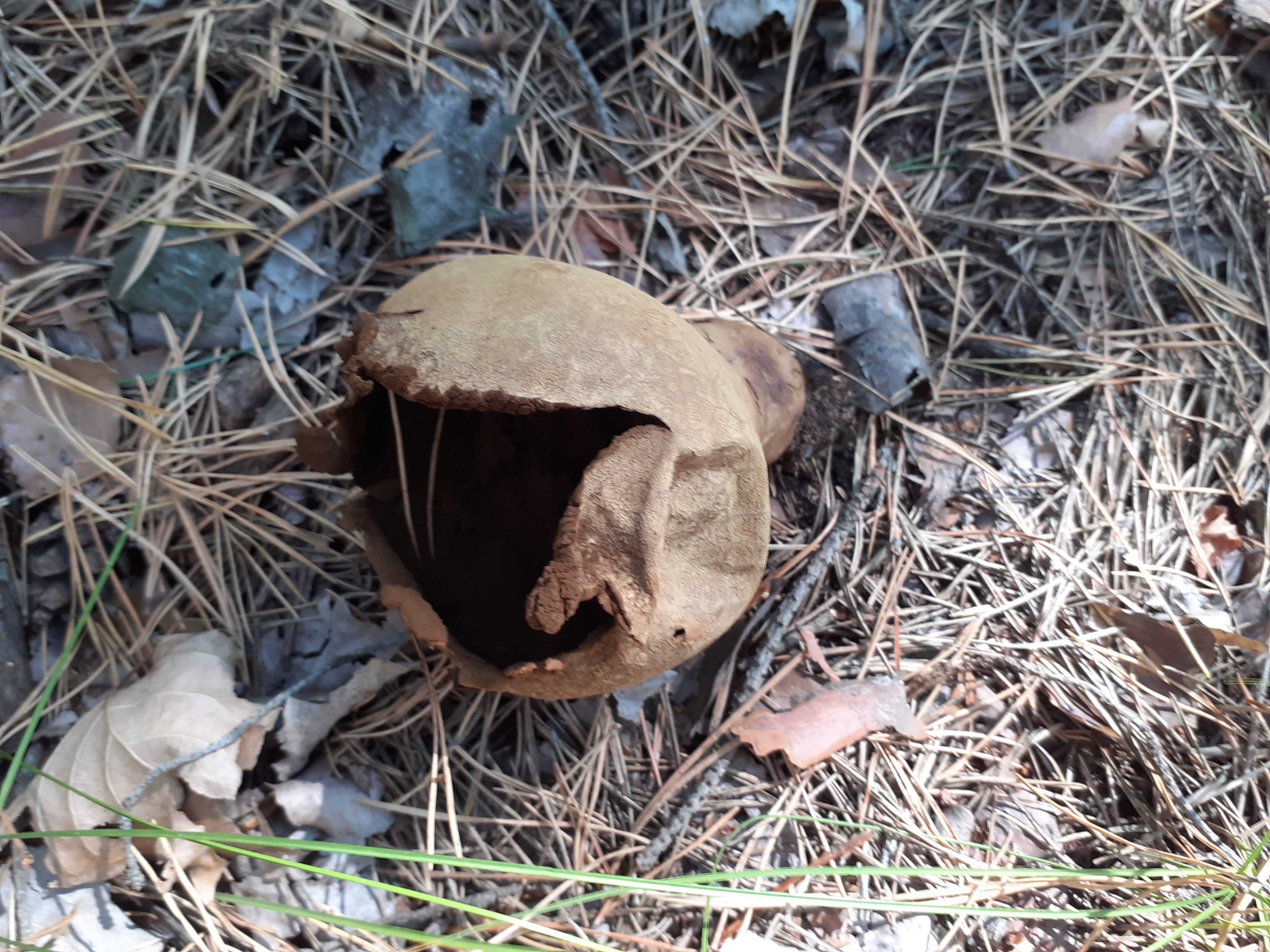 Дощовик у сосновому лісі